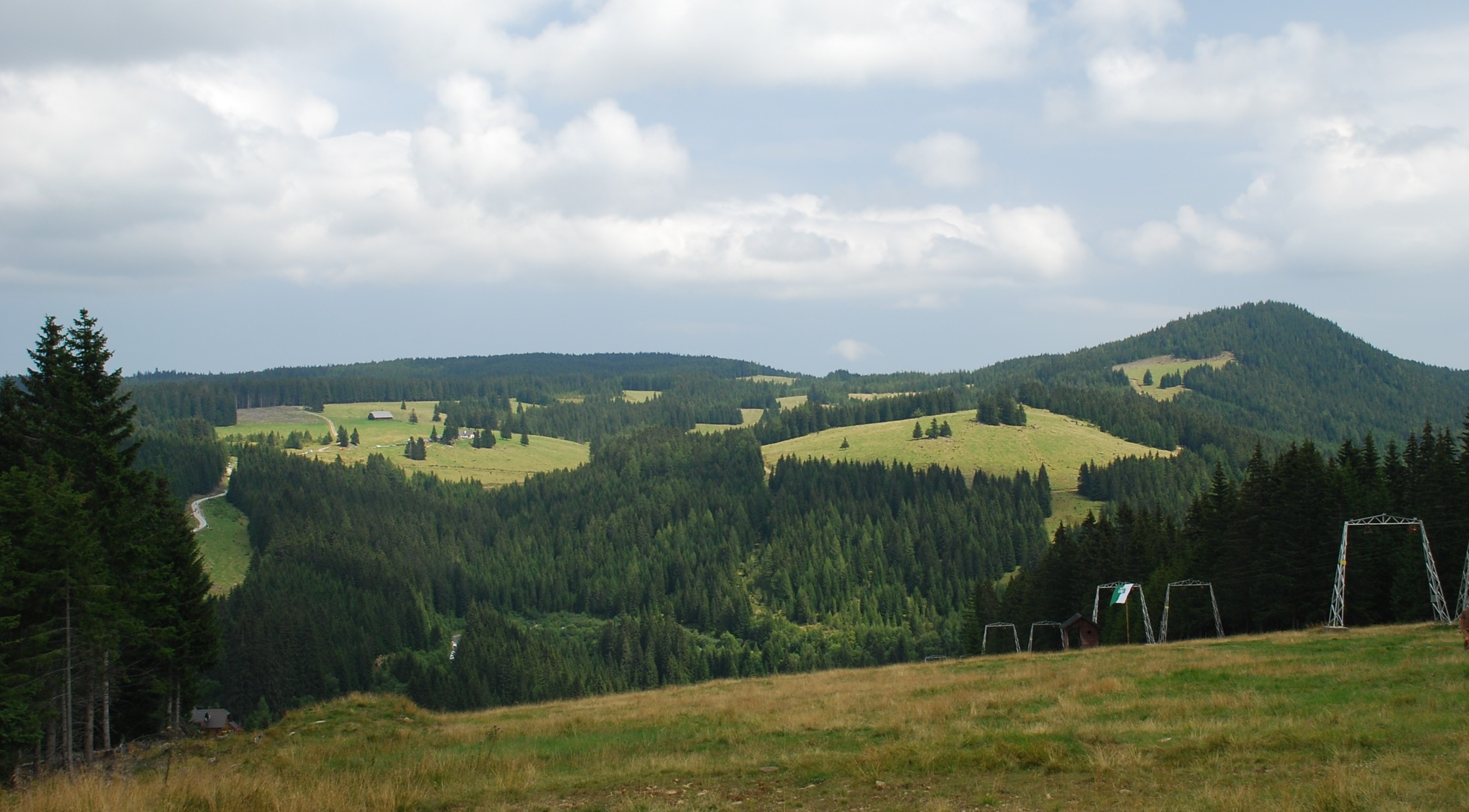 Freiländer Alm von der Stocker Alm